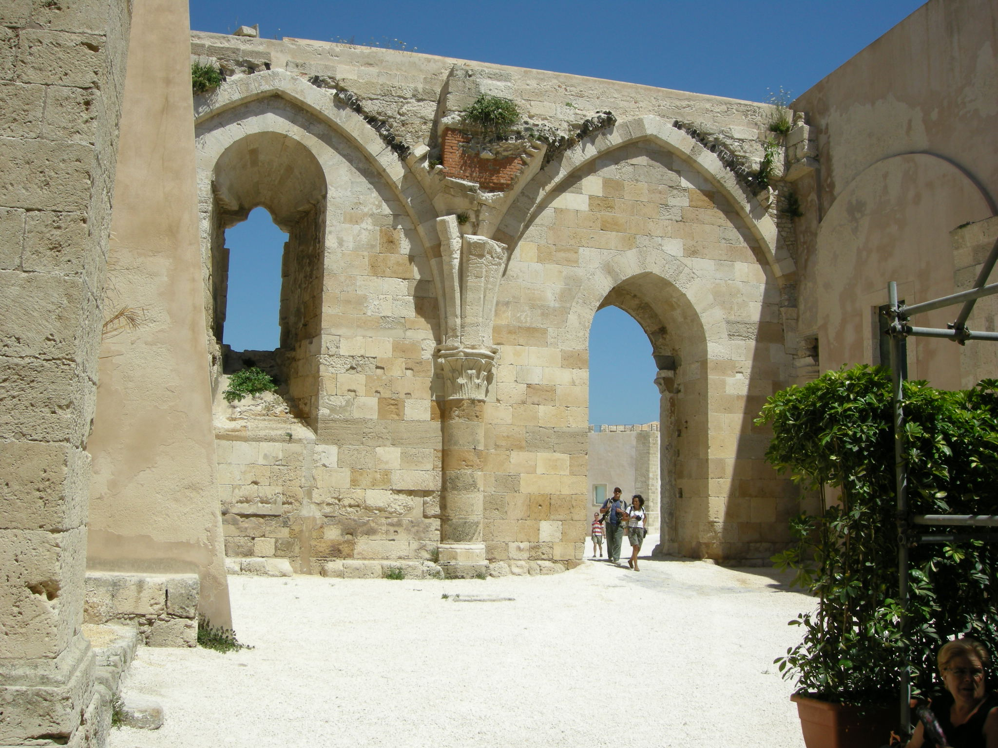 Ortigia, castello maniace